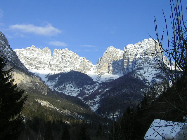 da Forno di Zoldo vista verso S, si distingue la Forcella de Matt tra il Sasso di Bosconero (2468m, a destra) e lo Sfornio (2425m, a sinistra)